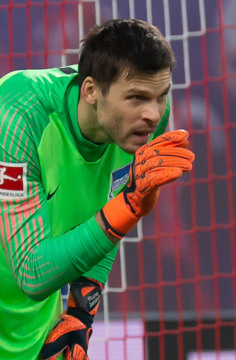 Fußball, Männer, 1. Bundesliga, RB Leipzig - Hertha BSC; Rune Jarstein (Hertha BSC, 22, Torwart, goalkeeper) dirigiert seine Abwehr vor einem Freistoß